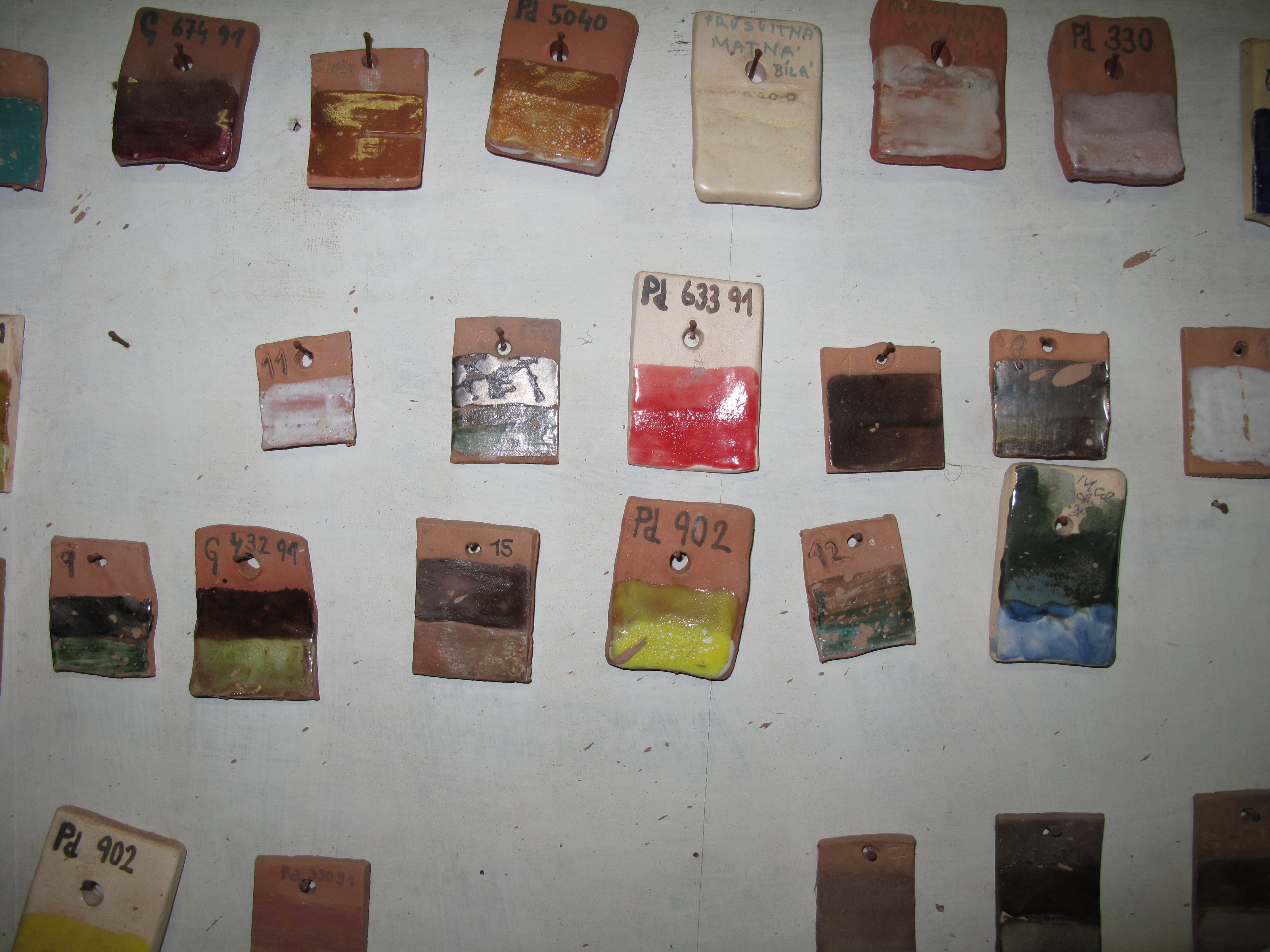 Barevný vzorkovník glazur. Ateliér Hruška, Praha Smíchov.